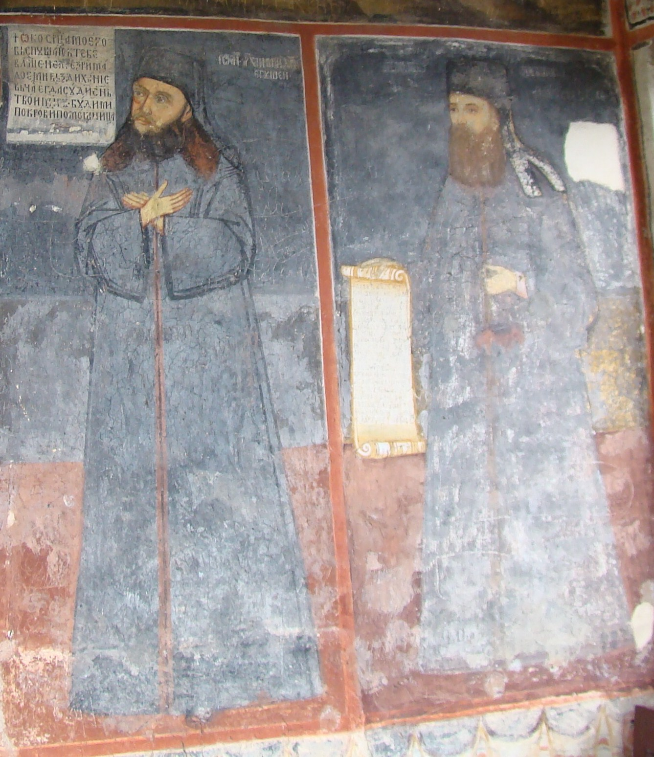 Bolnița „Adormirea Maicii Domnului”, Mănăstirea Hurezi, Vâlcea